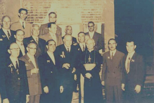 Algunos de los fundadores de la Casa Italia en San José, Costa Rica.